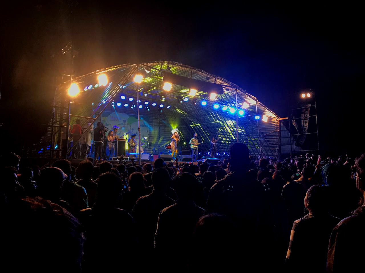 בינת אל פאנק בהופעה במסגרת פסטיבל "זירו" 2017